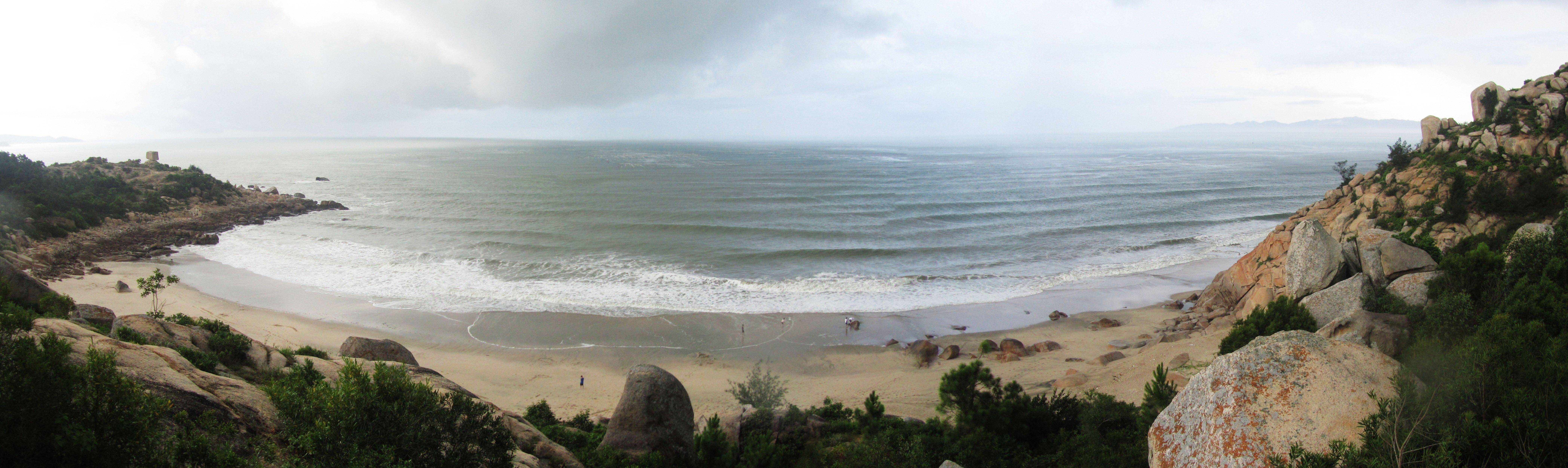 自诏安梅岭镇望洋台所看到的南海。